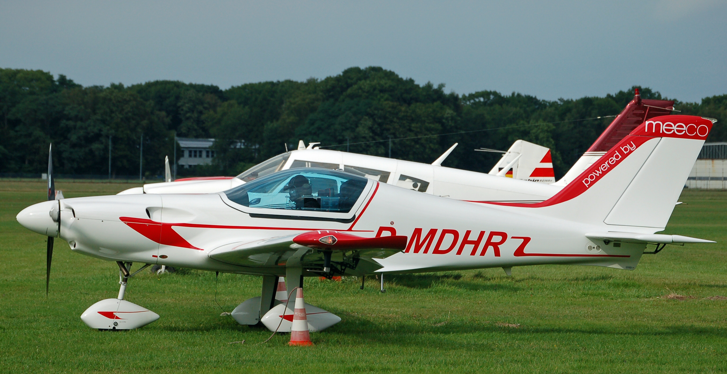 Corvus CA-21 Phantom (D-MDHR) auf dem Flugplatz Uetersen